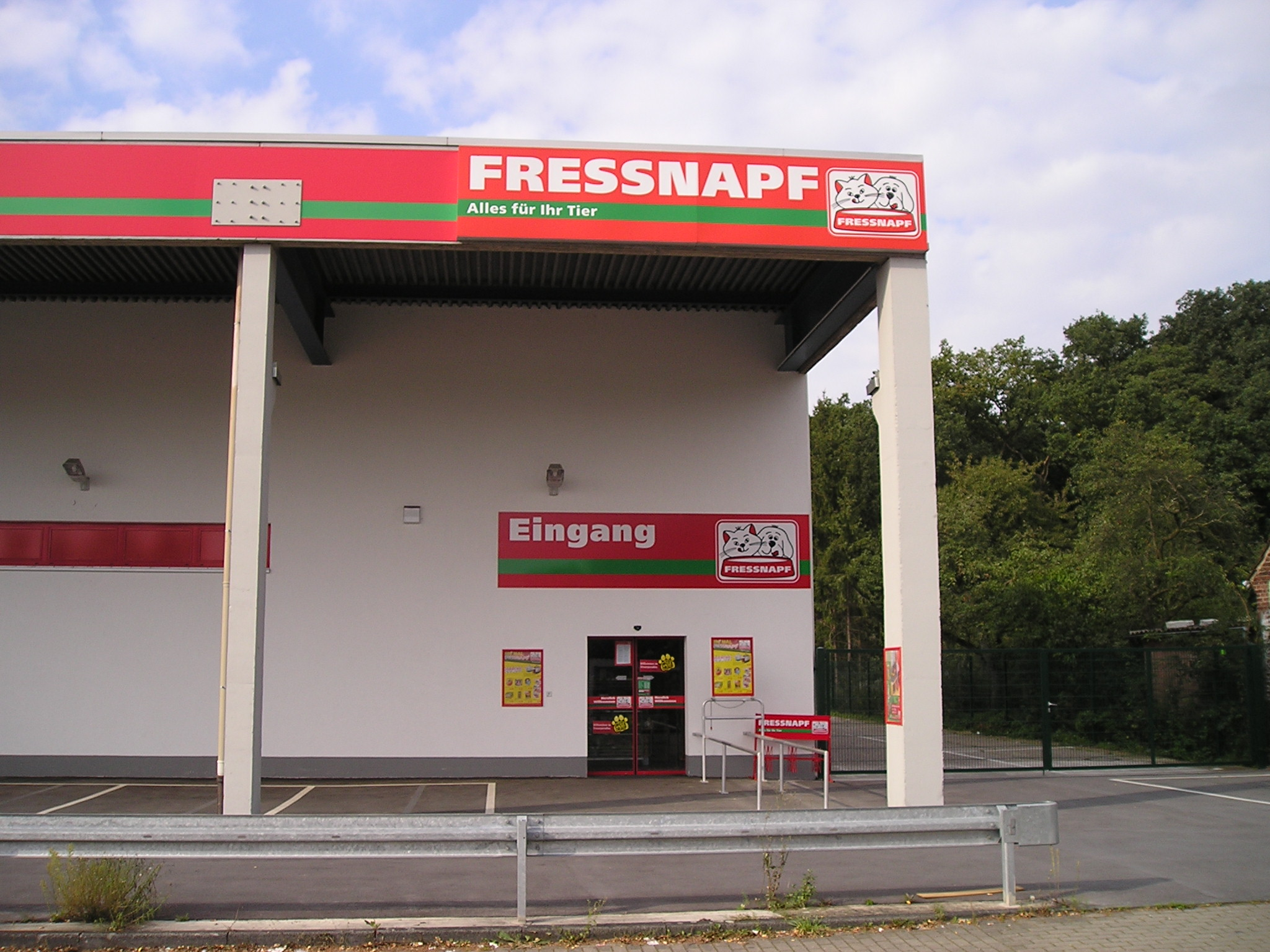 Fressnapf Markt in Monheim am Rhein